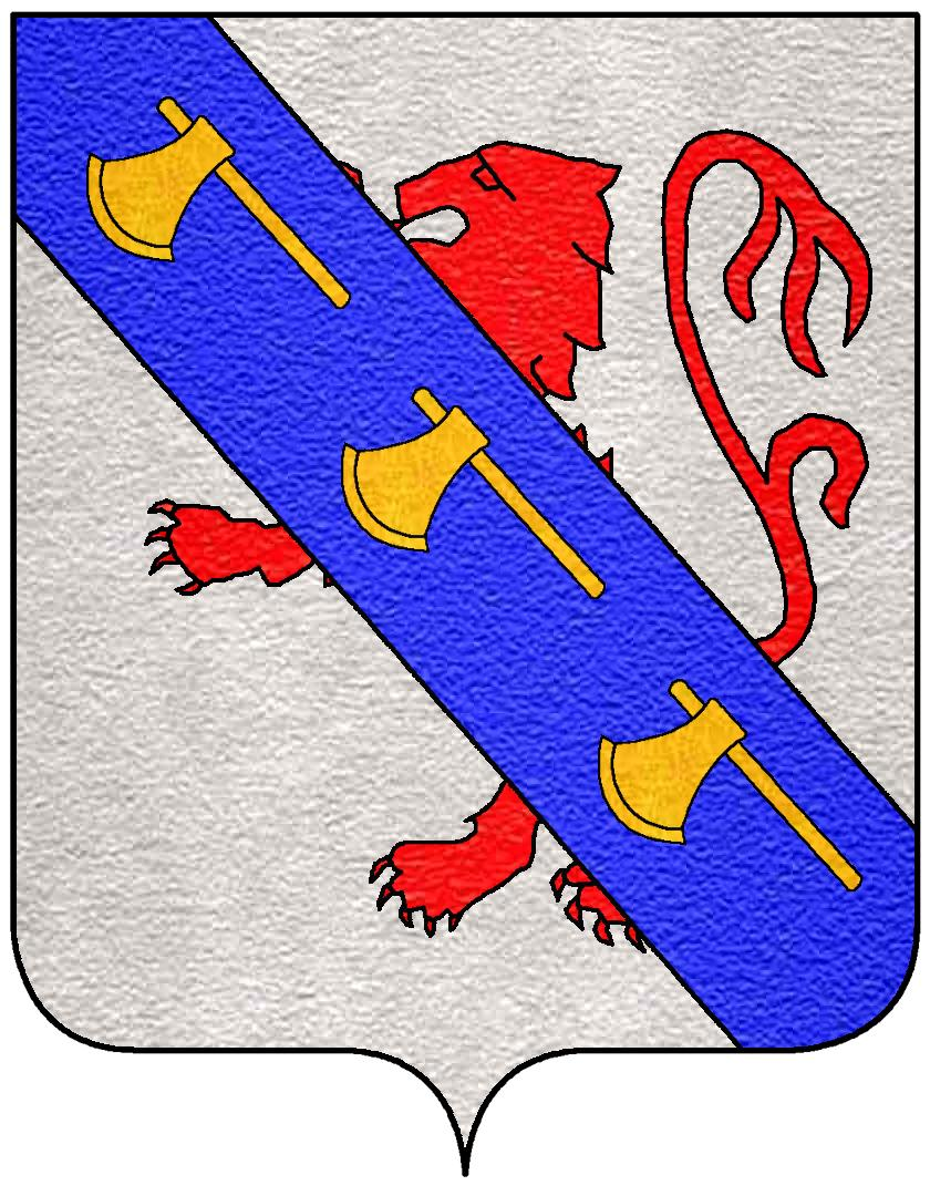 Stemma della famiglia Acciapaccio